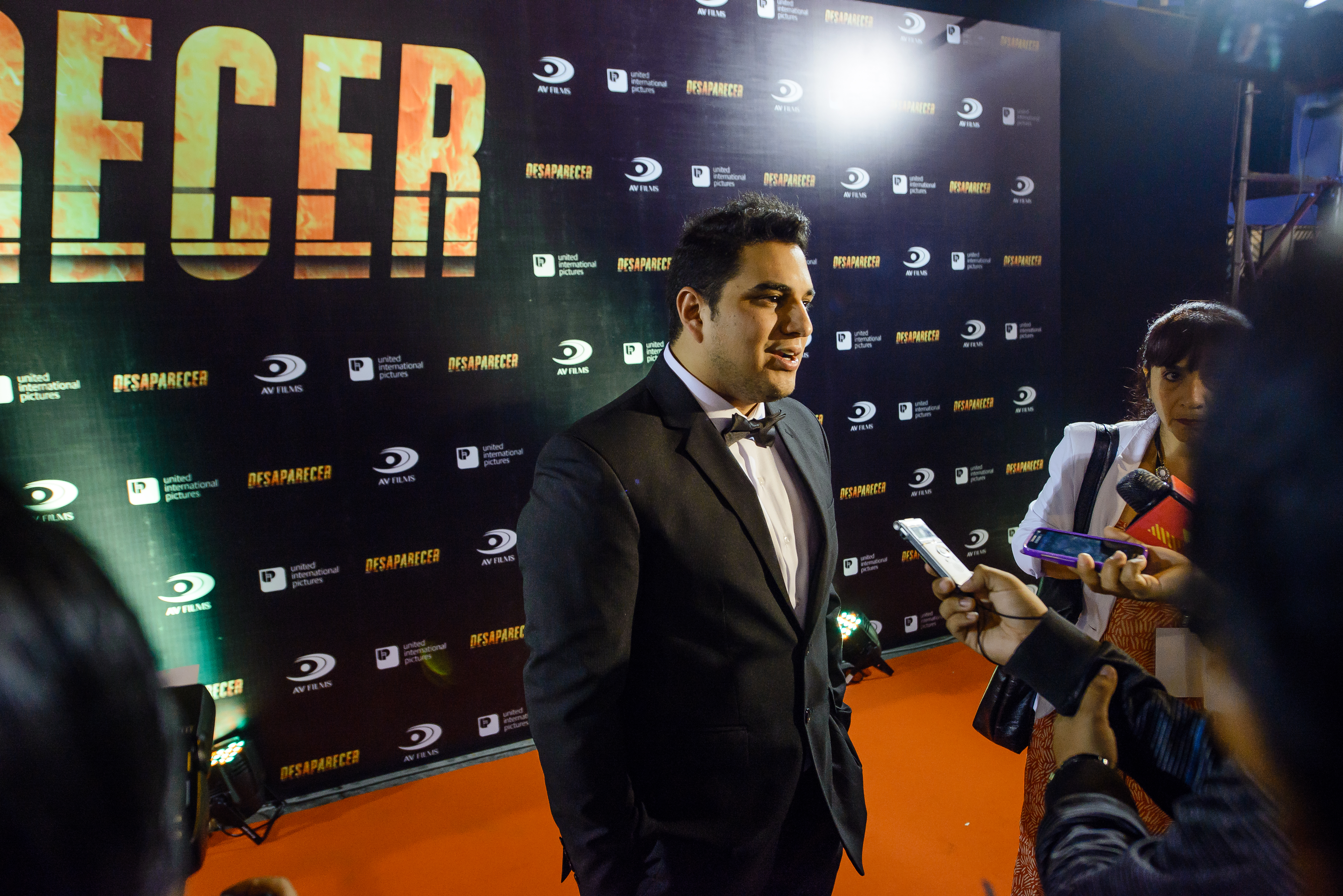 Dorian Fernández-Moris en el avant premiere de Desaparecer.